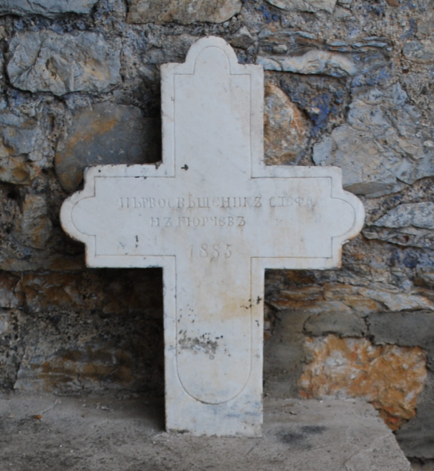 Гроб во Црквата „Св. Богородица“ Каменско во Охрид. Македонија